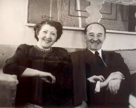 Charlotte and Louis Bergman circa 1950